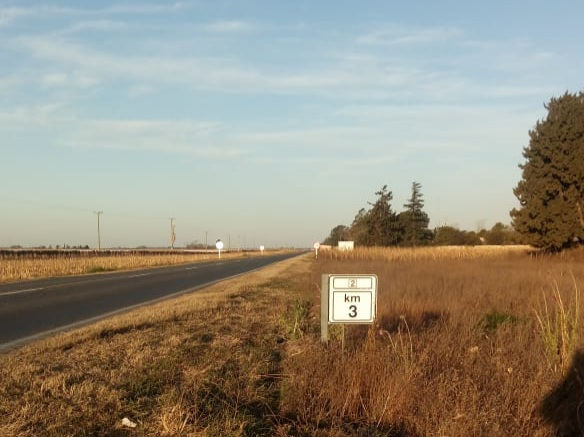 Tramo inicial de la RP2 y su identificación